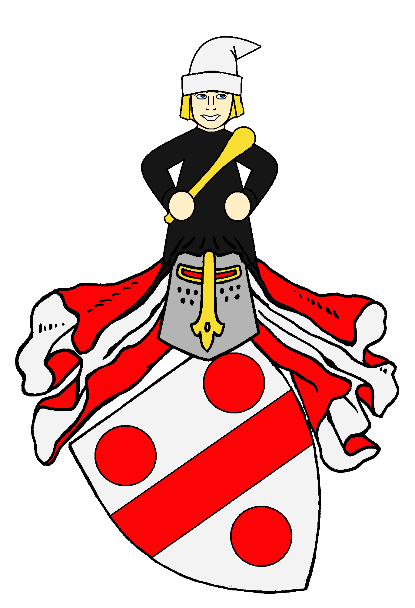 Stammwappen der Kolb von Wartenberg (Grafen (Kolb) von Wartenberg, Grafen von Wartenberg-Roth). Pfälzisches Adelsgeschlecht mit Besitz in Wachenheim, Kaiserslautern und Mettenheim, das sich nach der Burg Wartenberg bei Kaiserslautern benannte und 1699 mit Johann Casimir II. Kolb von Wartenberg in den Reichsgrafenstand erhoben wurde. Die Grafschaft mit Gütern in der Pfalz und Rheinhessen gehörte zwischen 1801 und 1814 zu Frankreich und kam 1815 bis auf Mettenheim (ging an Rheinhessen) an Bayern. Johann Kolb von Wartenberg, urkundlich 1450: „In Silber ein roter Balken, begleitet von drei (2:1) roten Kugeln. -Helmzier: Jünglingsrumpf in schwarzer Gewandung und silberner Zipfelmütze, eine goldene Keule (Kolben) schräglinks vor sich haltend. -Helmdecke rot-silbern.“ 1699 mit einem goldenen Jagdhorn „verbessert“. Gräfliches Wappen 1786 geviert. Das Wappen der alten Grafen (Kolb) von Wartenberg ging durch Adoption auf die Grafen von Erbach über.